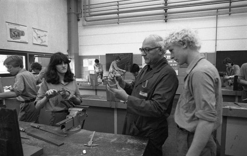 Informationsreise für Journalisten zu Modellprojekten des Bundes. Projekt des Bundesministeriums für Bildung und Wissenschaft. Förderung der Berufsausbildung von benachteiligten Jugendlichen (Benachteiligungsprogramm) bei der Firma Hoechst. 01.-03.09.1982